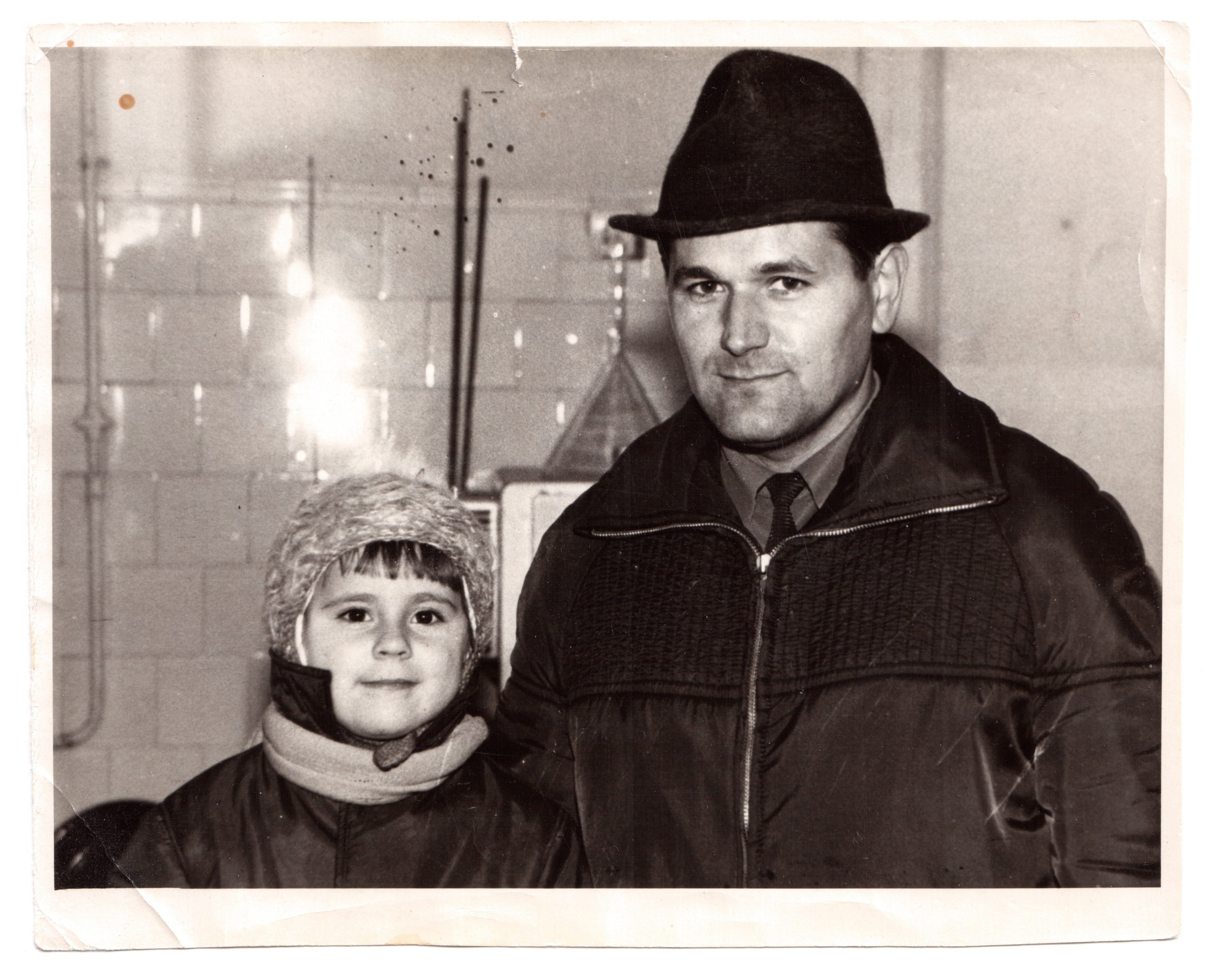 фото